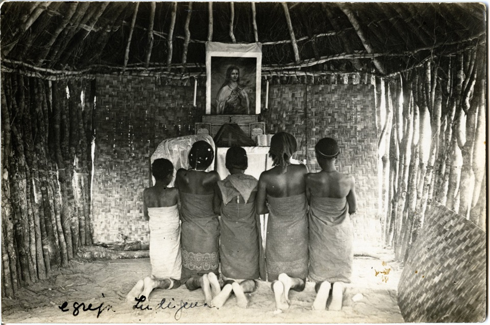 Postal da Guiné-Bissau